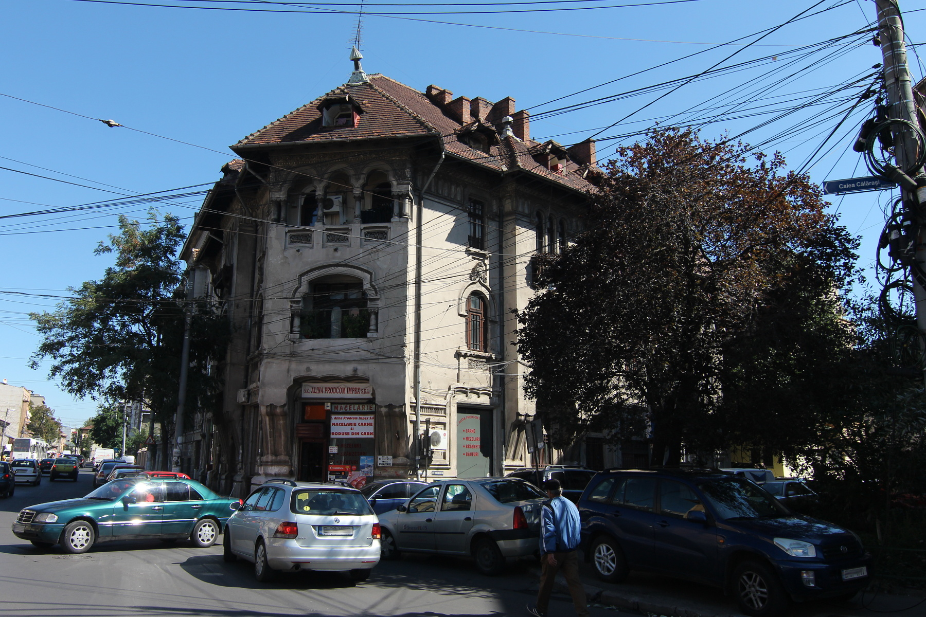 Imobil pe Calea Călărașilor